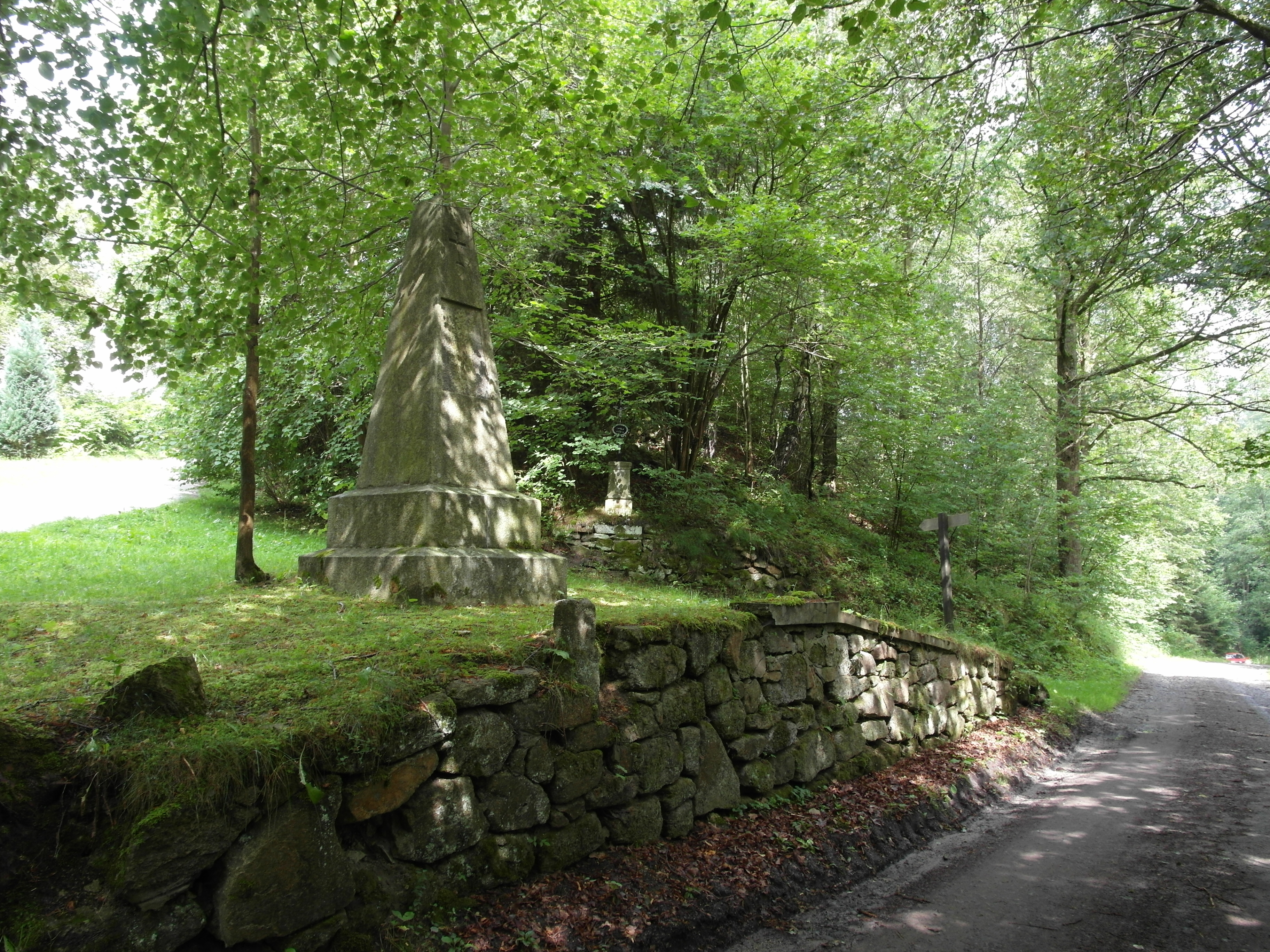 Pozůstatek pomníku obětem první světové války v zaniklé obci Veveří.